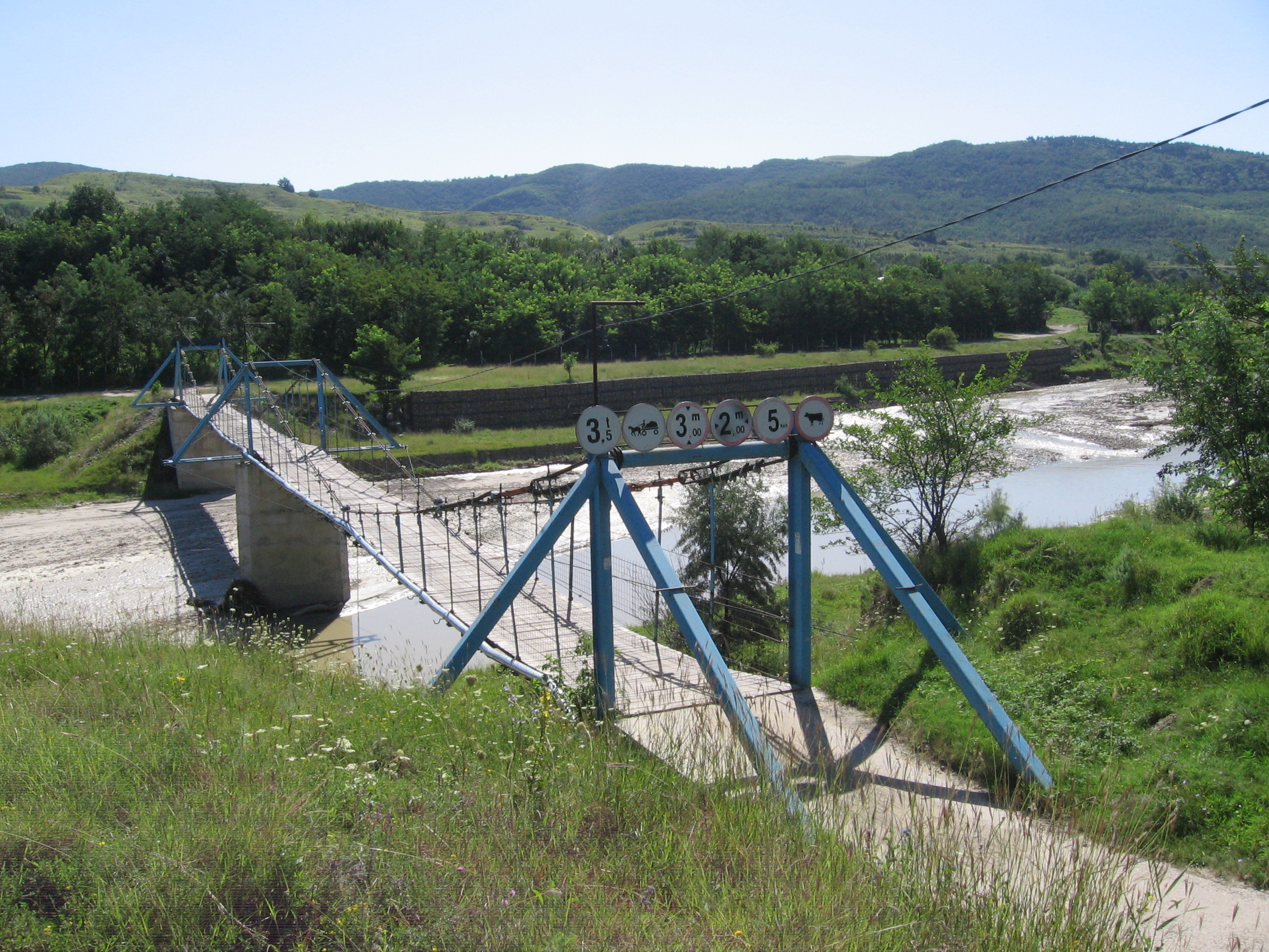 Visutý most v Manasii, Buzau.